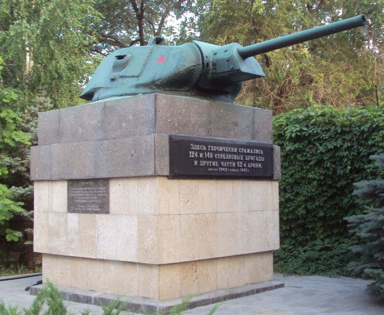 Элемент памятника Линия обороны Сталинграда: башня танка Т-34, расположенная по адресу улица Тракторостроителей 1А/2.